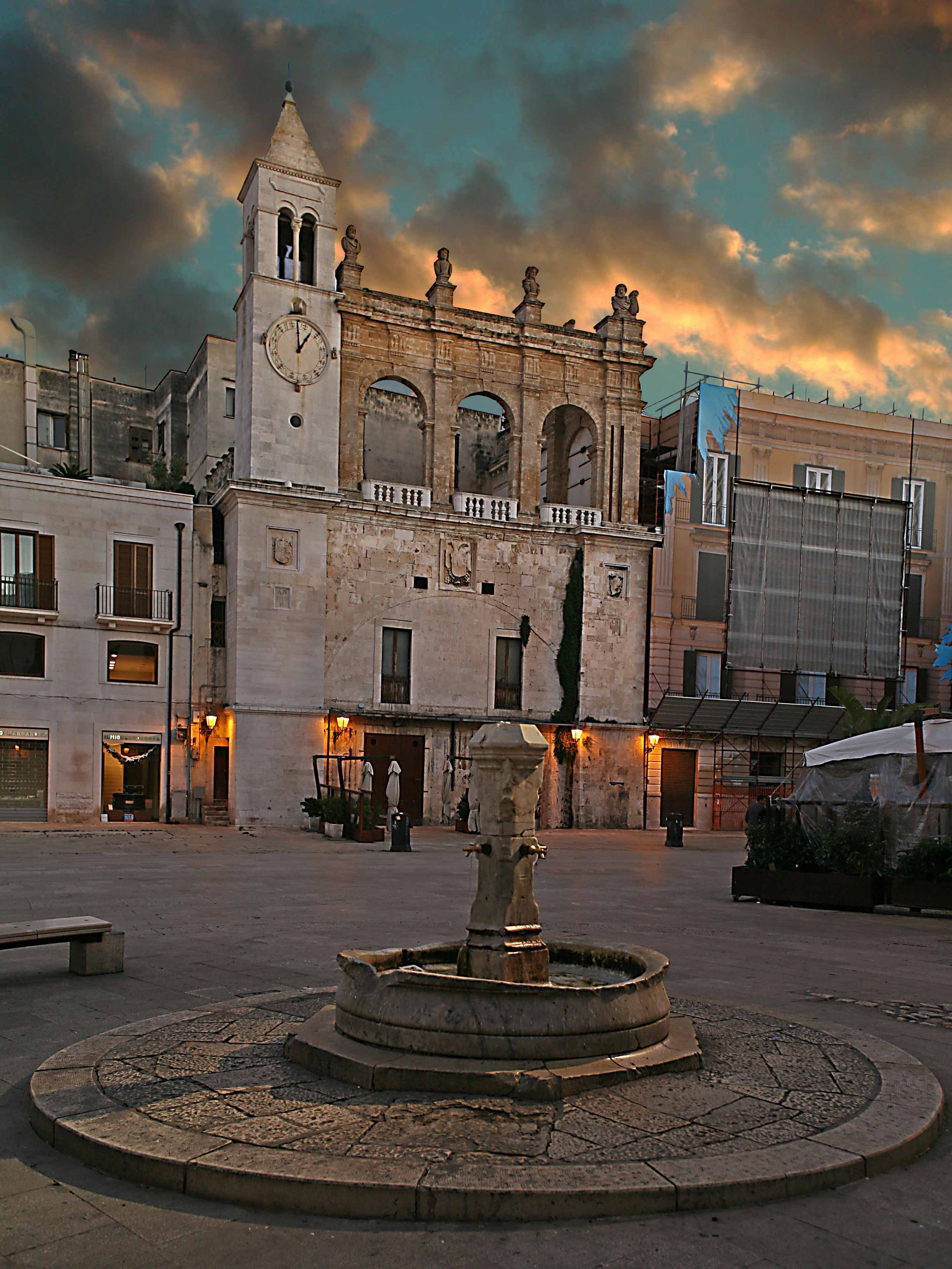 Storico palazzo nel centro del borgo antico